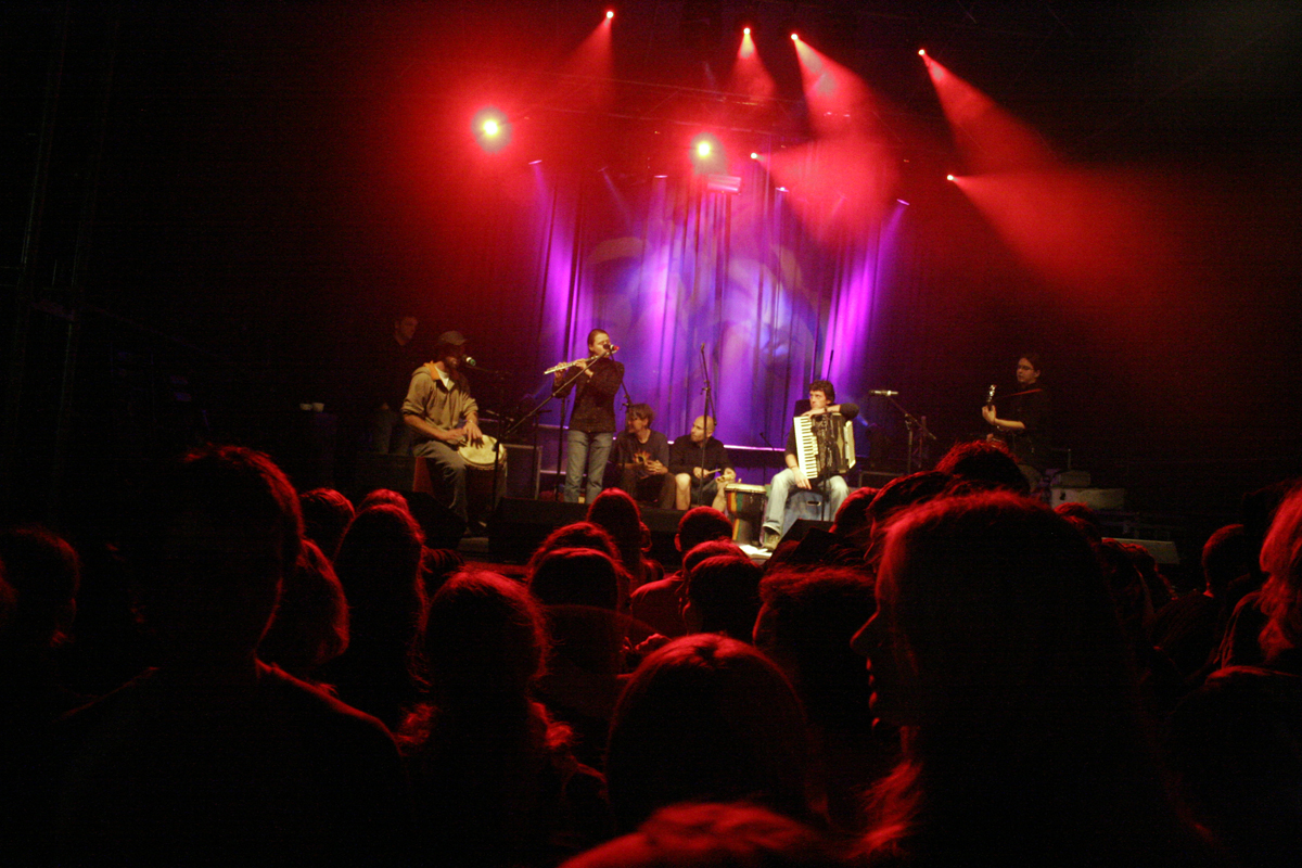 Koncert Nie po Drodze. Zalew Arkadia. Godz. 19.30. 5. urodziny Stowarzyszenia Aktywności Społeczno-Artystycznej "Nie Po Drodze".